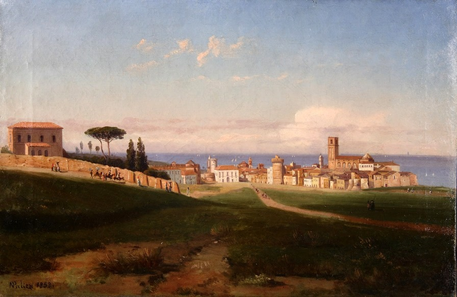 Vue de Vasto